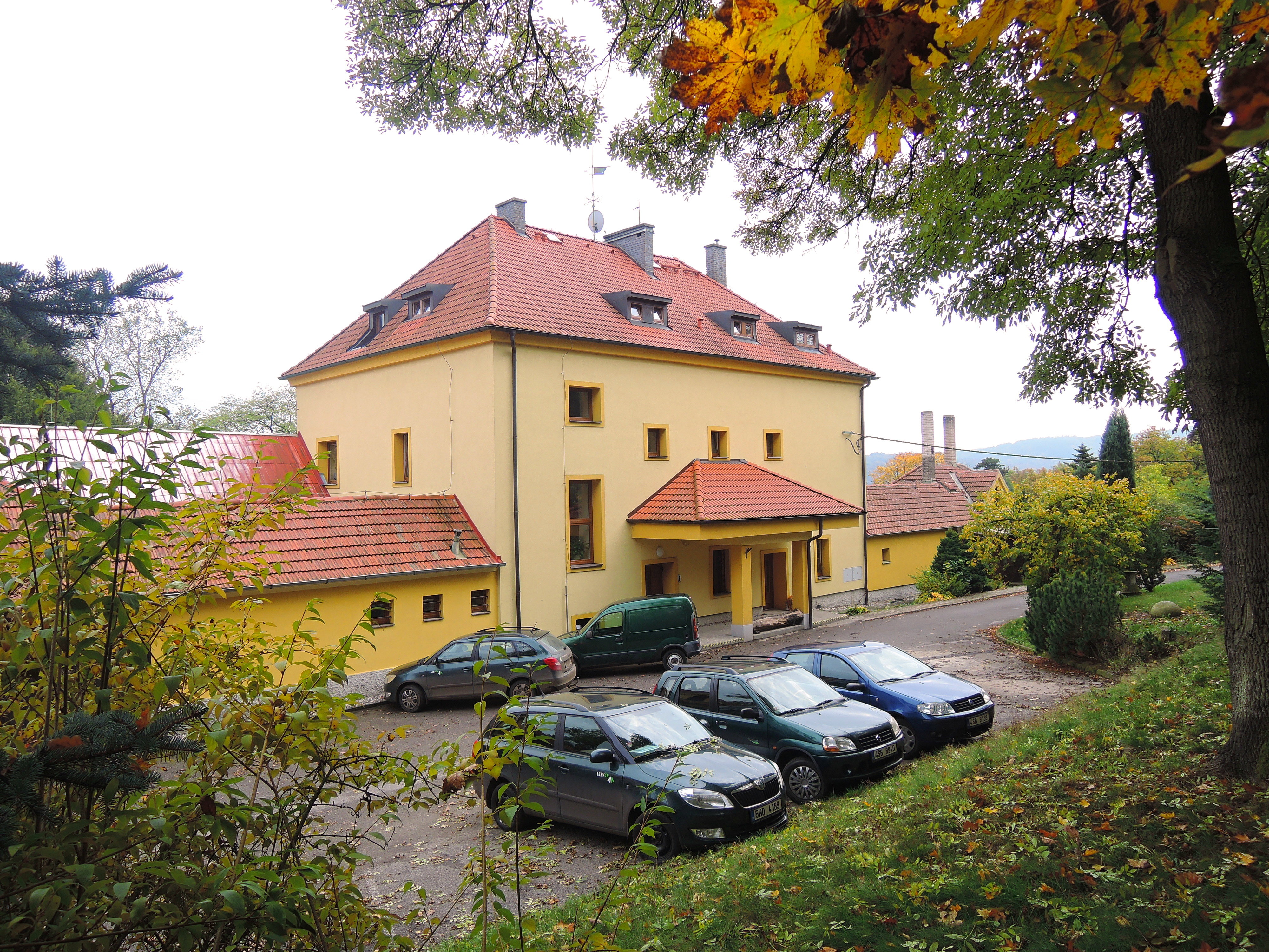 Budova Lesní správy Křivoklát, tzv. Nechlebárna